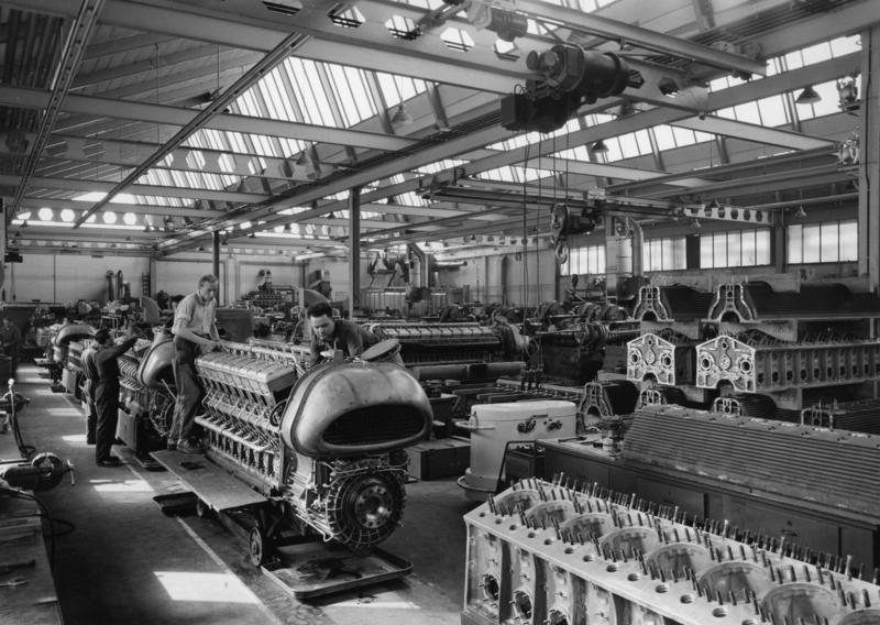 Daimler-Benz A.G. Werk Stuttgart-Untertürkheim Blick in die Halle der Schiffsmotoren